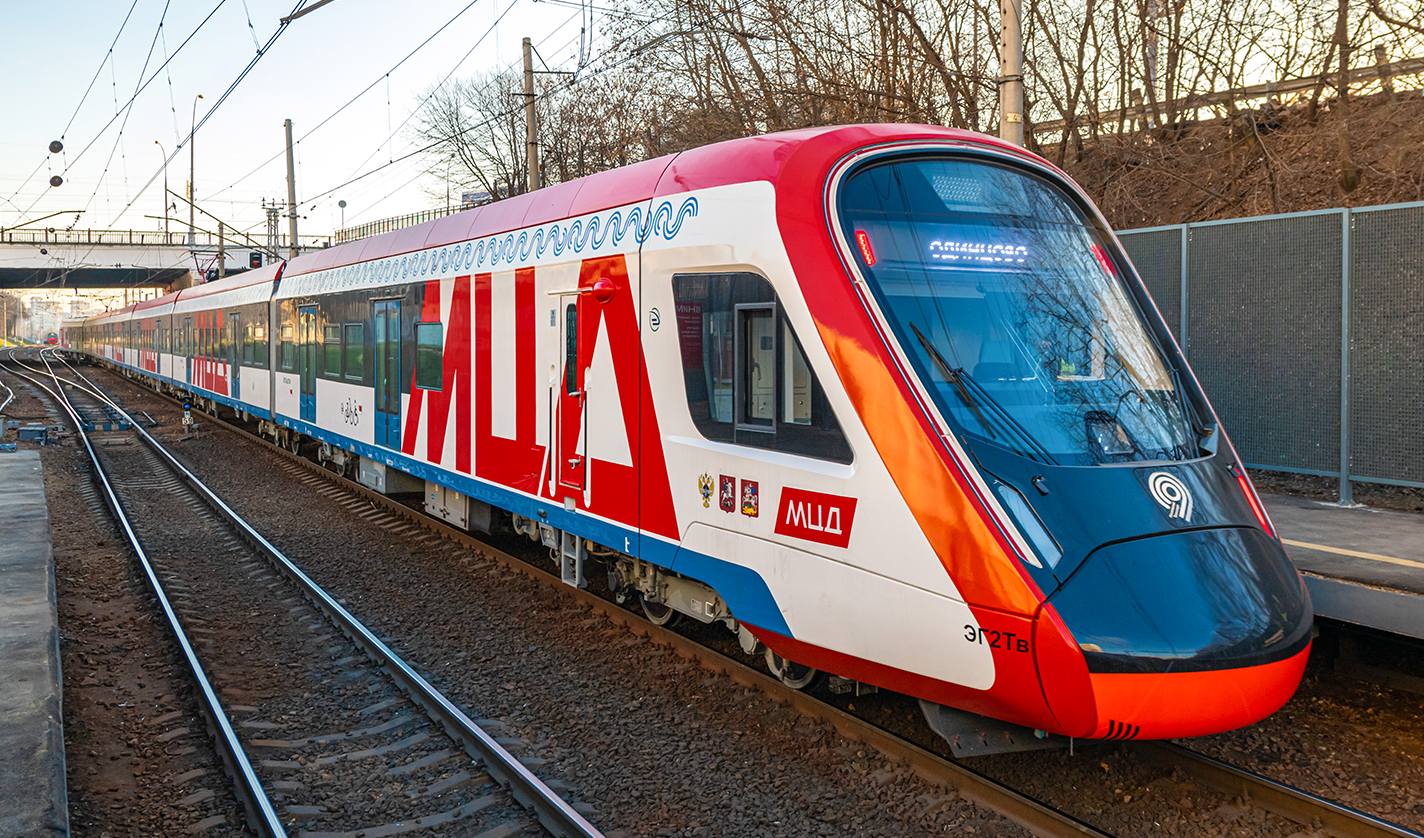 Электропоезд ЭГ2Тв версии 2.0 отправляется от платформы Беговая в сторону вокзала